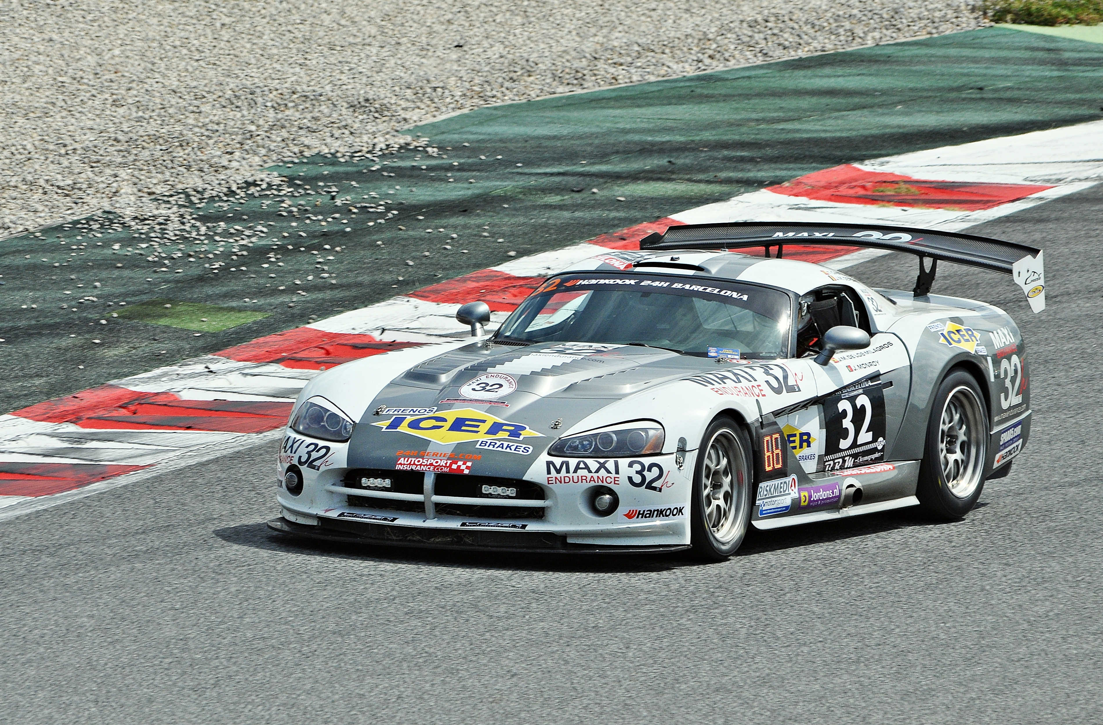 24 hoaras de Barcelona-circuito de Cataluña